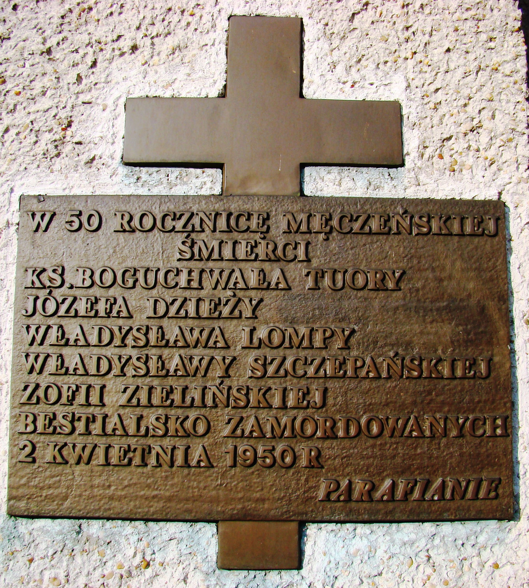 Tablica upamiętniająca 50-tą rocznicę mordu w Poczesnej, wmurowana przy wejściu do kościoła parafialnego w Poczesnej